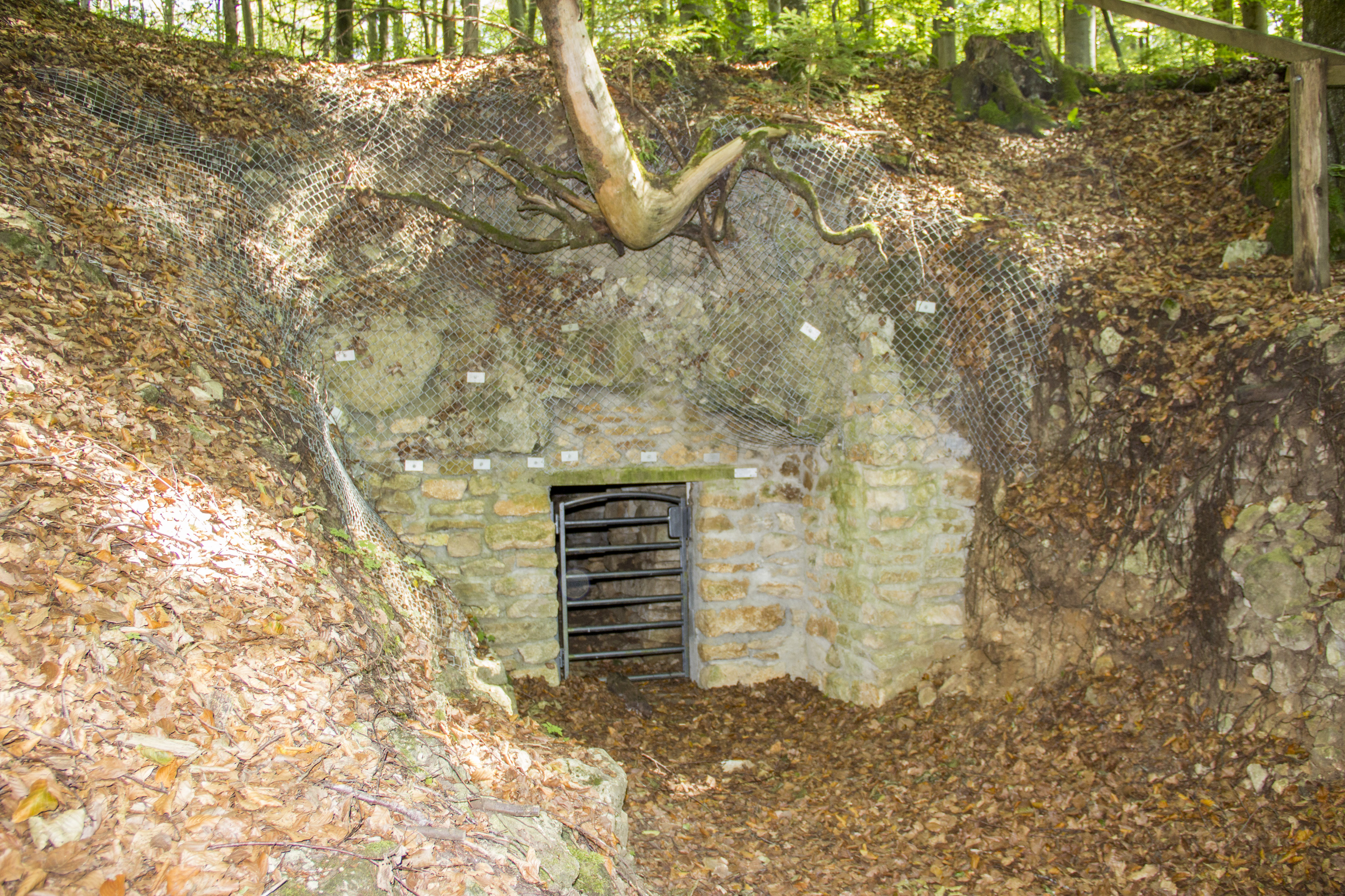 Grubschwart, ehemaliges Bergwerk, Höhle, Stollen, Raitenbucher Forst, Stolleneingang